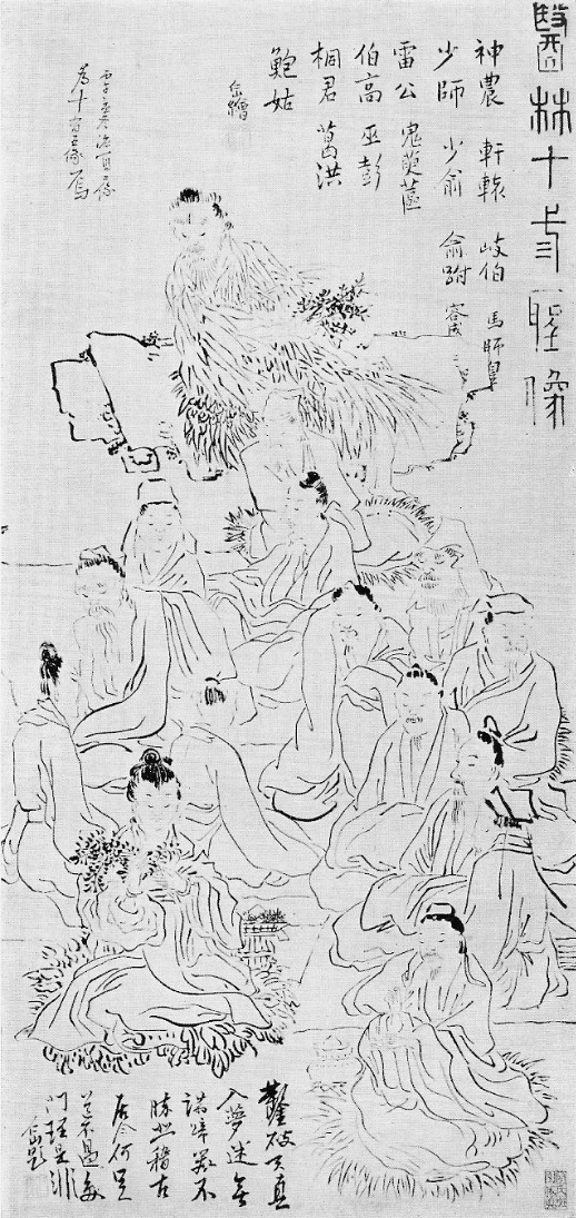 Les Treize Saints de la Médecine. Papier, 122x59cm, daté octobre 1846, signé. Sceau: rouge (unique occurrence de ce sceau). Un des beaux échantillons de la peinture de figures de Su Renshan, dans un style contrôlé, sur composition complexe